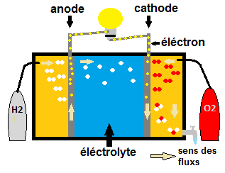 Shéma résumant le principe de la pile a combustible